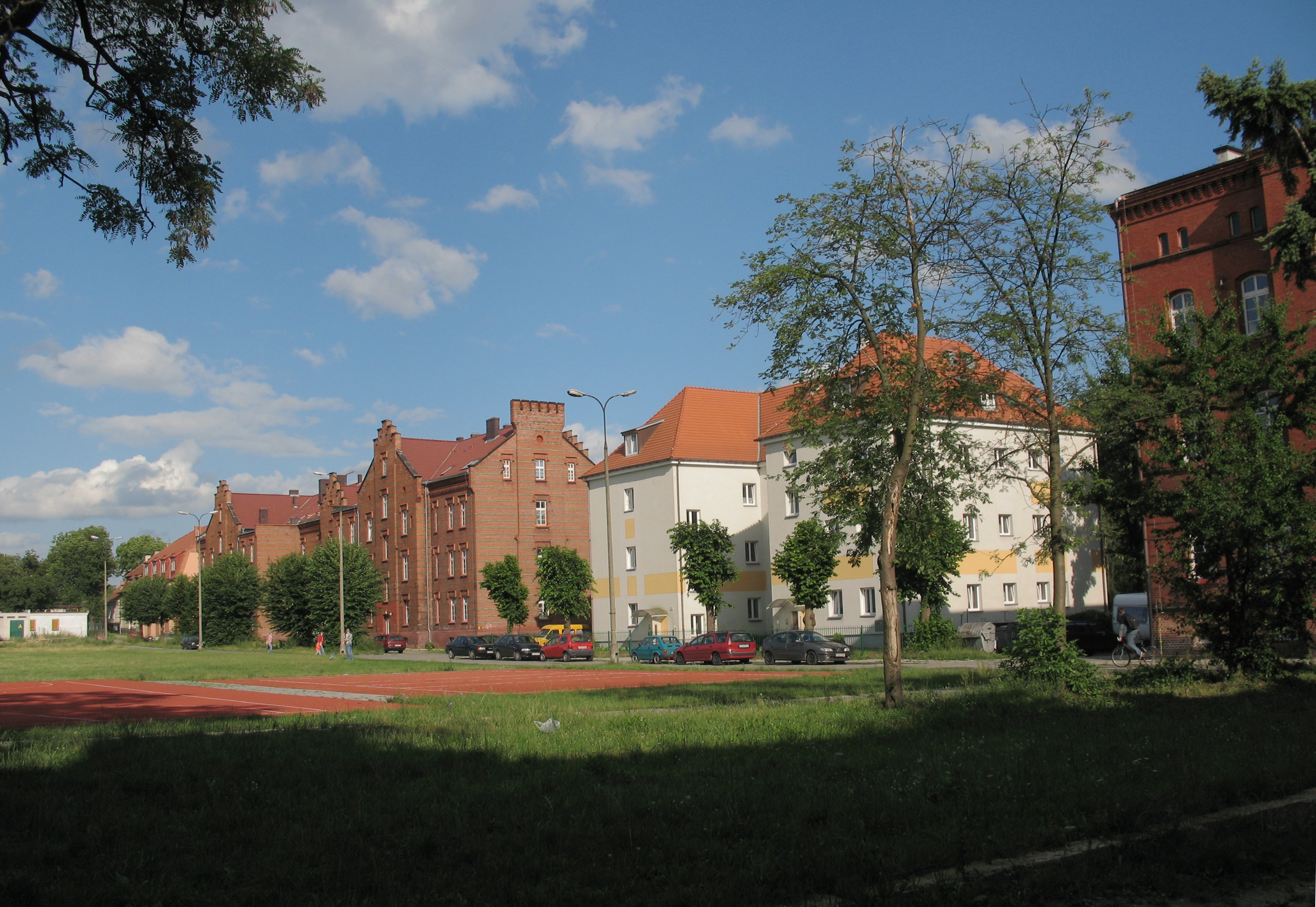 osiedle mieszkaniowe powstające ze szprotawskich koszar. Rok 2007